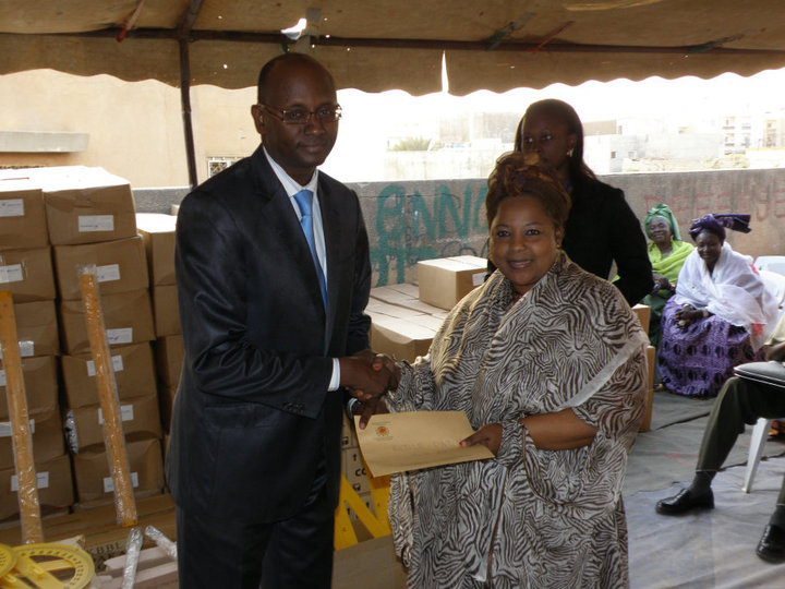 Remise d'un lot de fournitures à une Directrice d'école